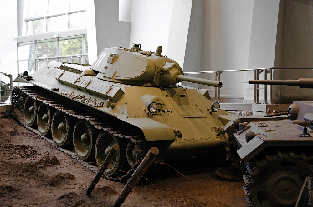 Экпазіцыя музея ВАв